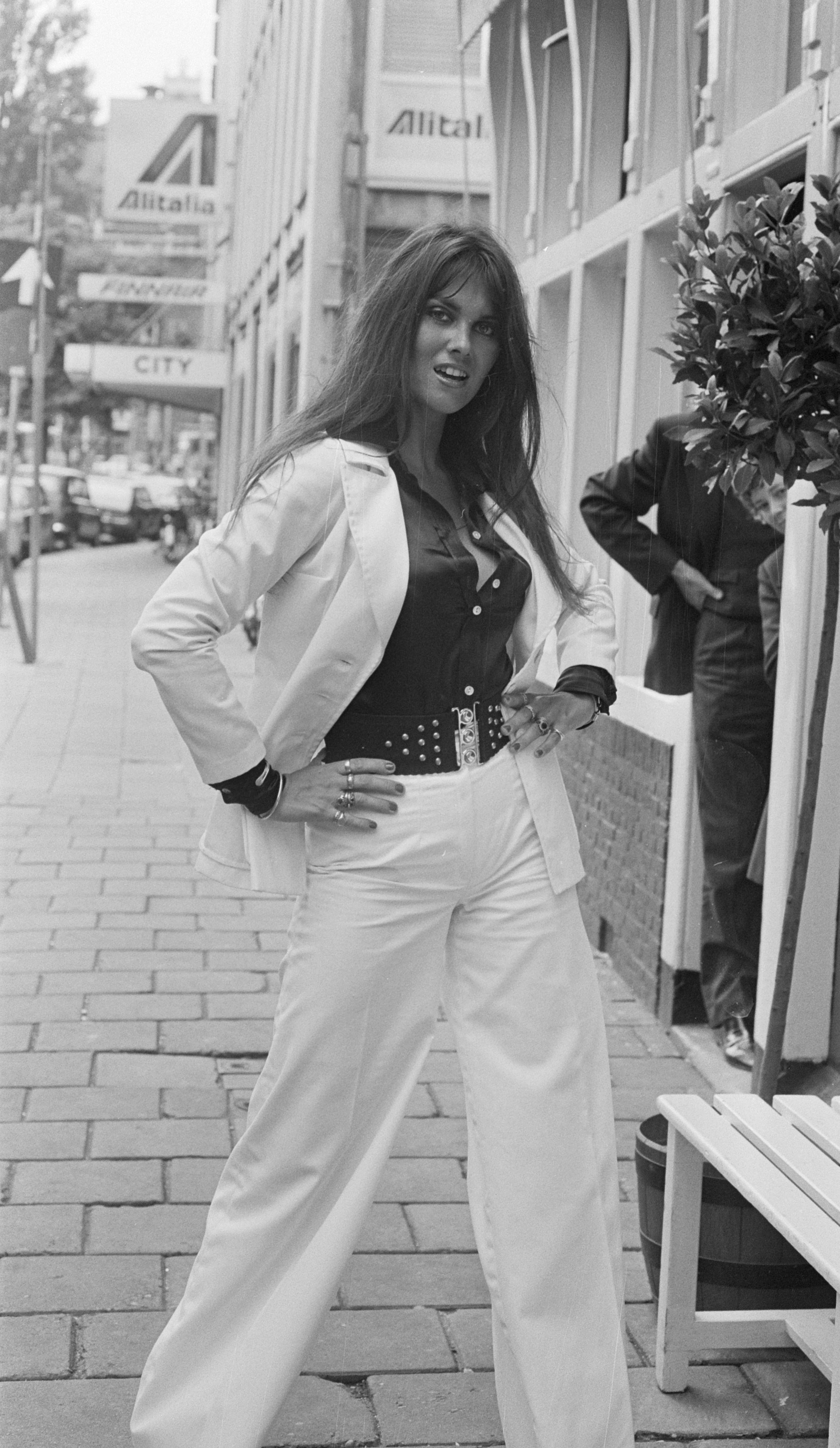 Actrice Caroline Munro in Amsterdam n.a.v. premiere van de film "The Golden Voyage of Sinbad"